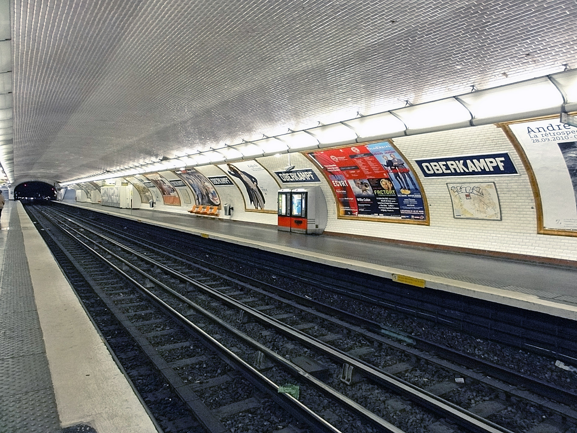 Station Oberkampf de la ligne 9 du métro de Paris, France.